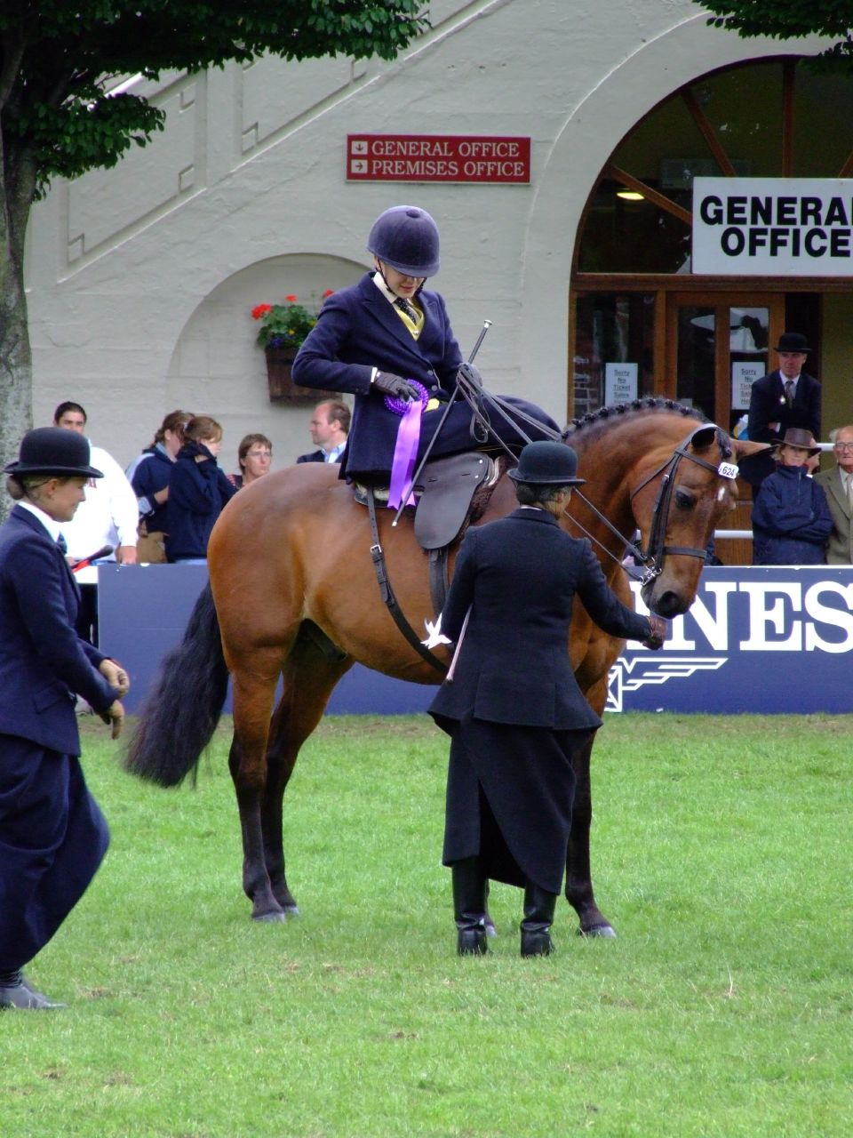 Prize Ribbons